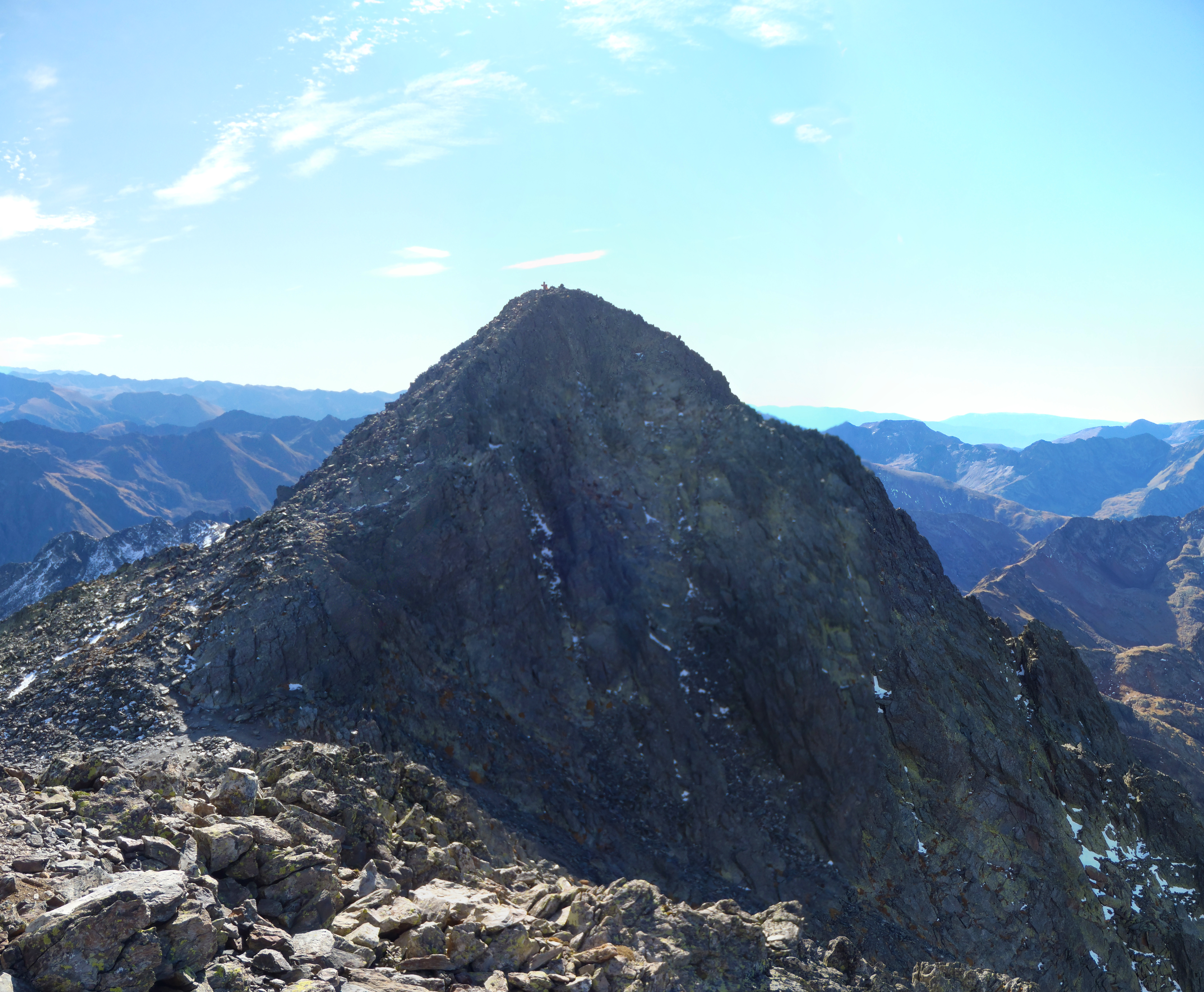 Pica d'Estats